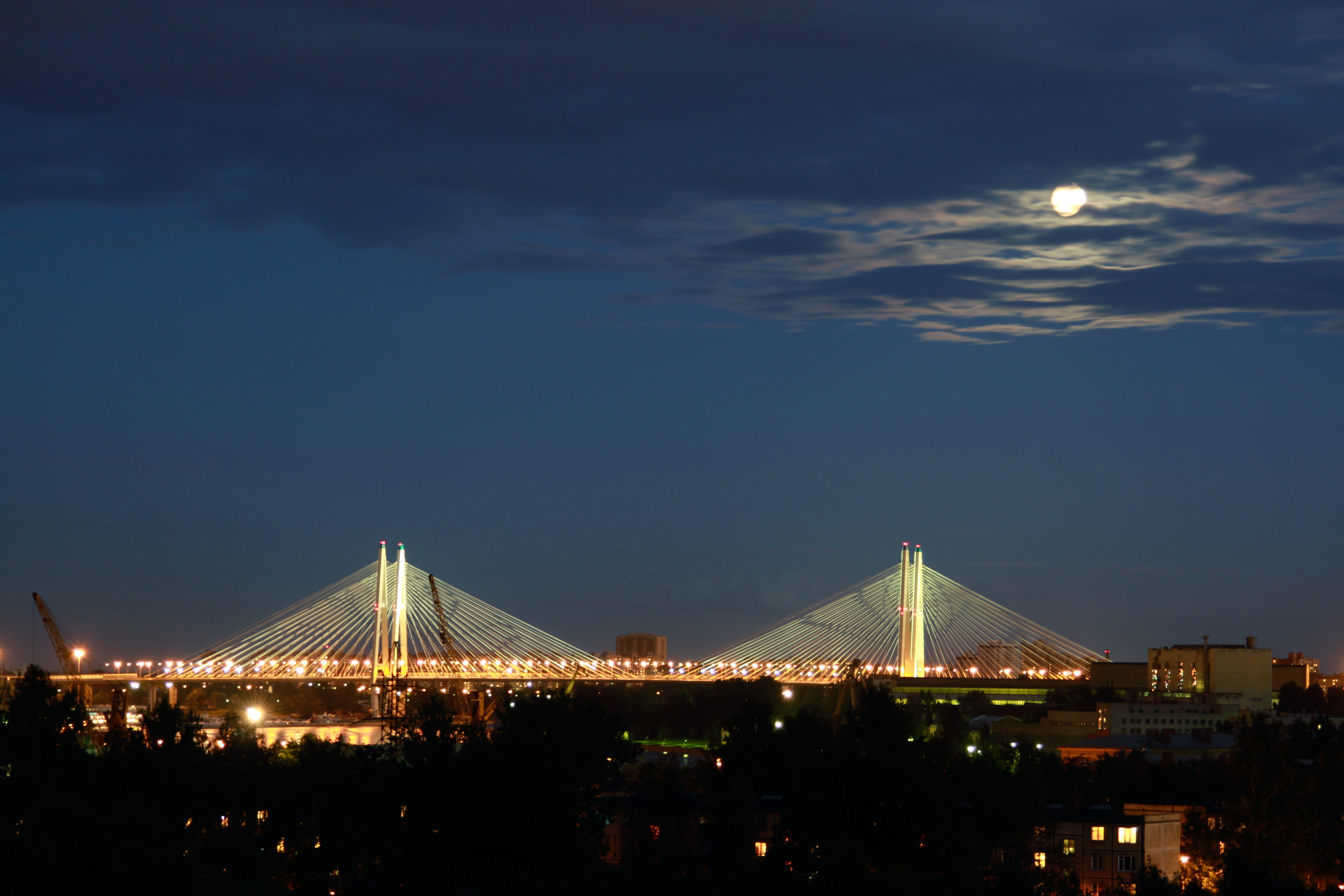 Большой Обуховский мост в Санкт-Петербурге (ночной вид)